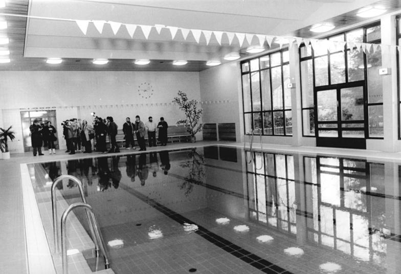 ADN-ZB Zimmermann 23.11.89 Berlin: Wandlitz- Auf Einladung des Verwaltungschefs Gerd Schmidt besuchten Journalisten erstmals die "Waldsiedlung" bei Wandlitz nördlich von Berlin, in der seit 1950 hinter 2.400 Metern Mauer und Zaun und strengbewacht die in Berlin ansässigen Mitglieder und Kandidaten des Politbüros des ZK der SED mit ihren Angehörigen wohnten. Das Schwimmbad soll künftig den Schülern der Wandlitzer Erich-Weinert-Oberschule für den Schwimmunterricht zur Verfügung stehen. (siehe auch 33+34N)